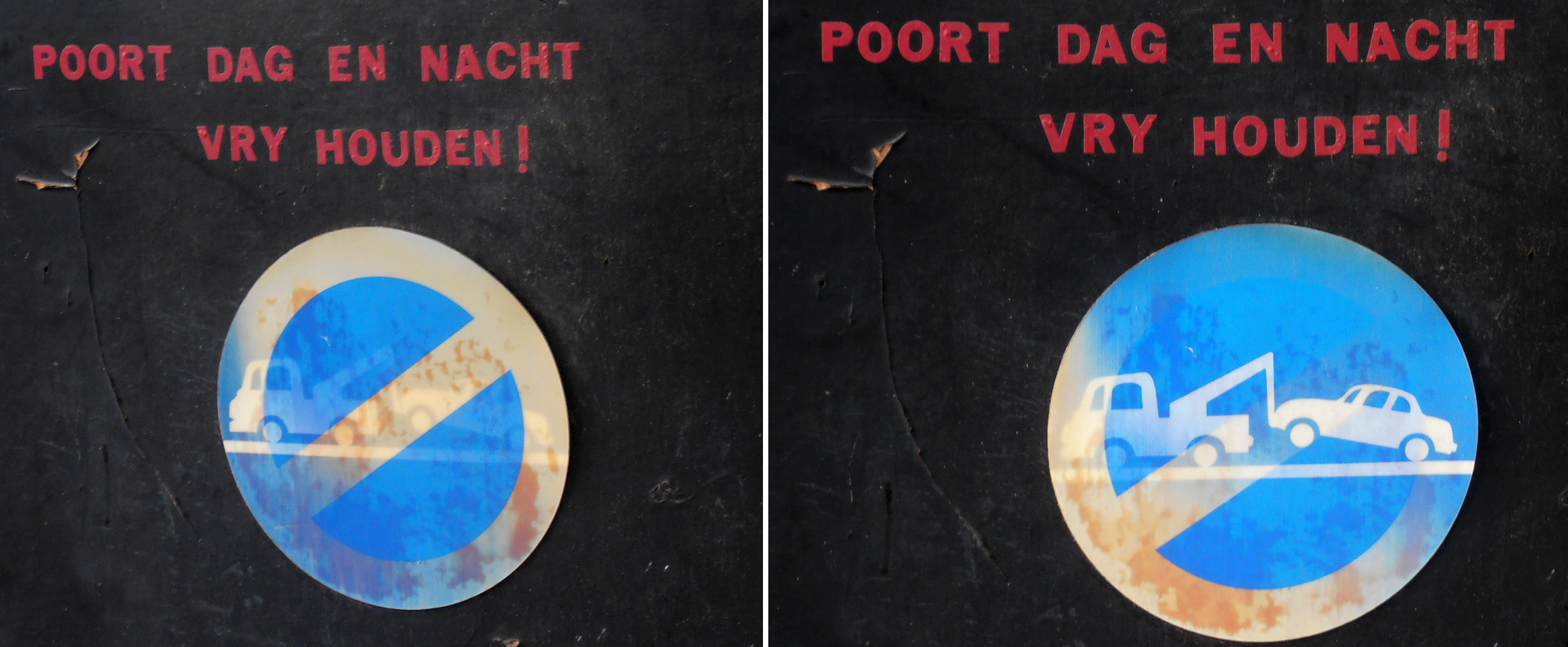 Lenticulaire afbeelding op een garagepoort